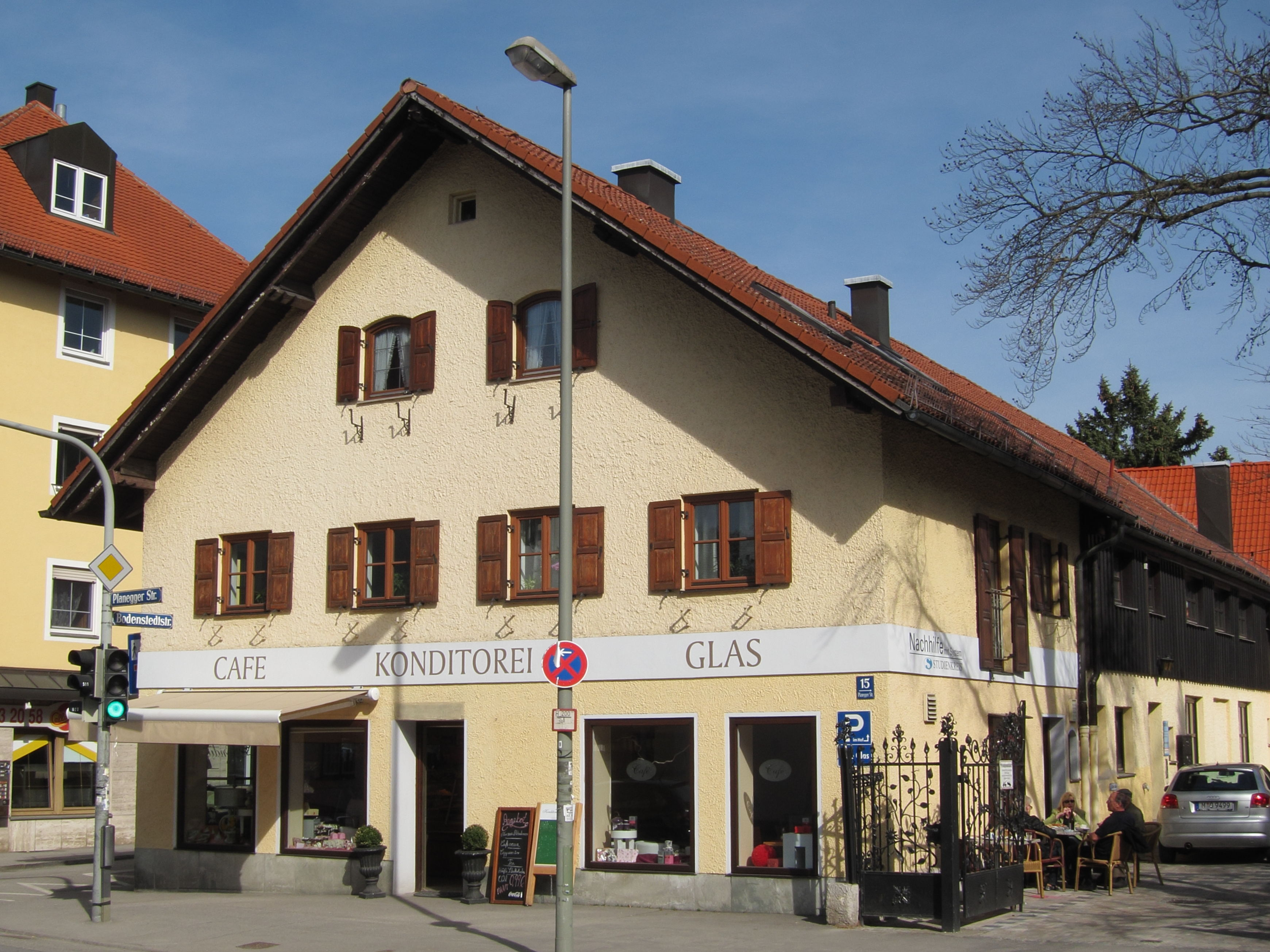 Planegger Straße 15; Ehem. Bauernanwesen, Wohnhaus 19. Jh., neubarockes Hofgitter.